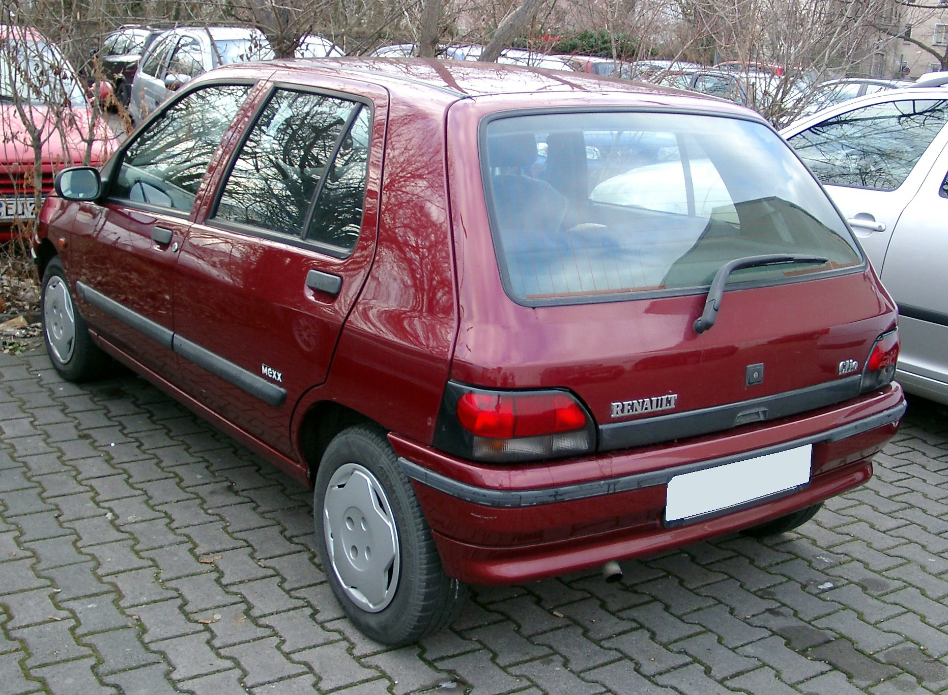 Renault Clio, 1. Generation